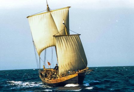 Реплика большого традиционного поморского палубного коча XVIII века (клуб "Полярный Одиссей", Петрозаводск).